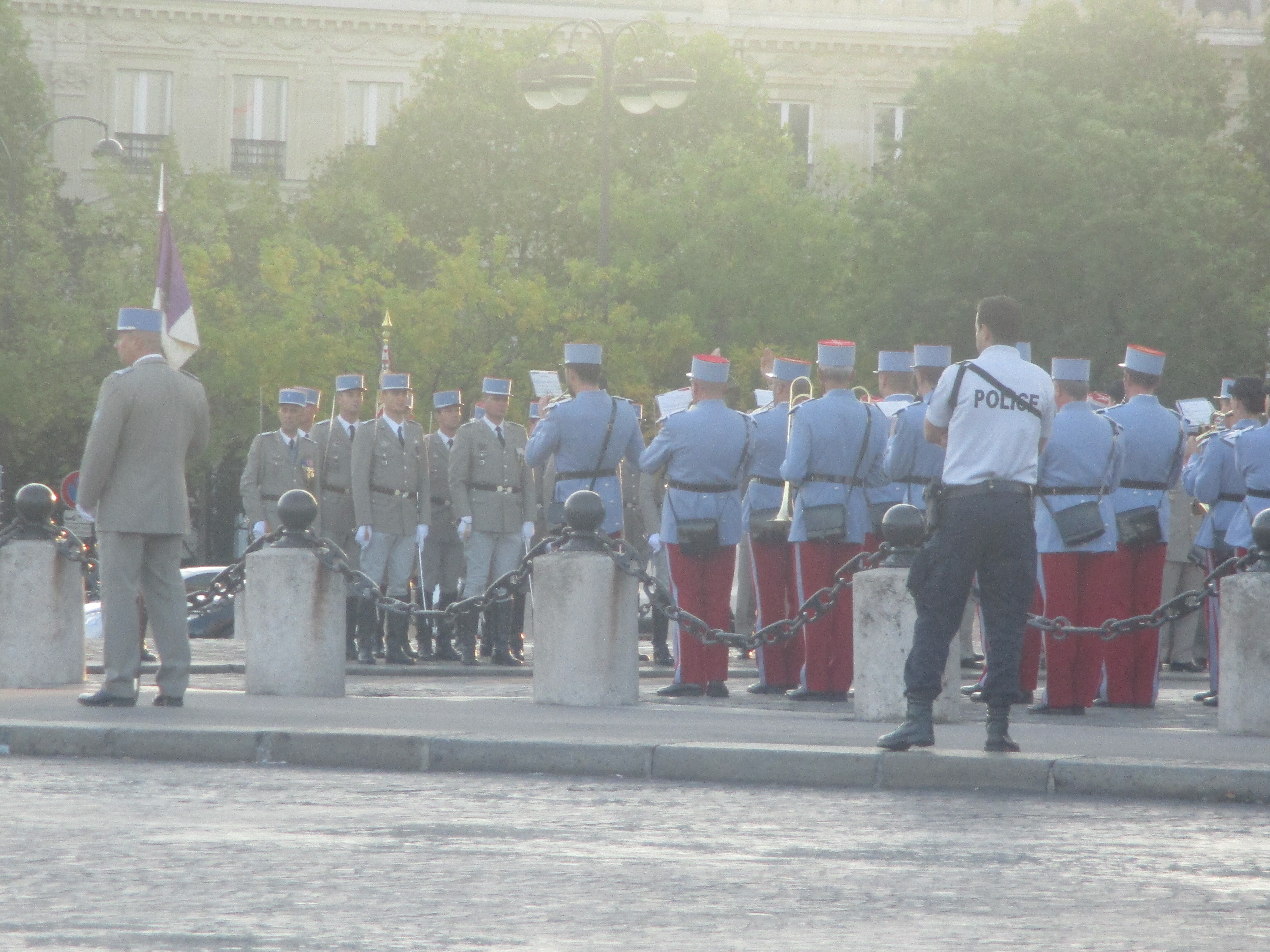 Cérémonie à l'Arc de Triomphe le 16 octobre 2016. Brigade de cavalerie légère.